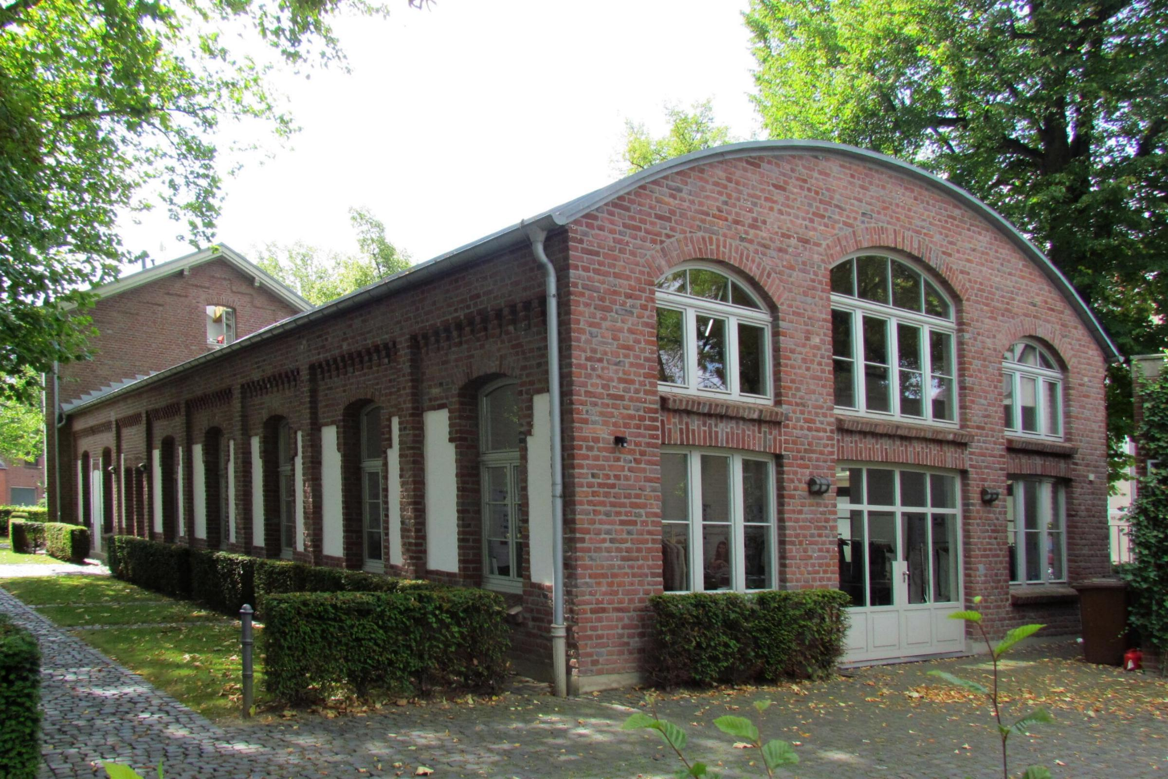 Ehemaliges RWE-Gebäude (früher Maschinen- und Kesselhaus des Elektrizitätswerks Osterath), Strümper Straße 1–7 in Meerbusch This is a photograph of an architectural monument. (1)